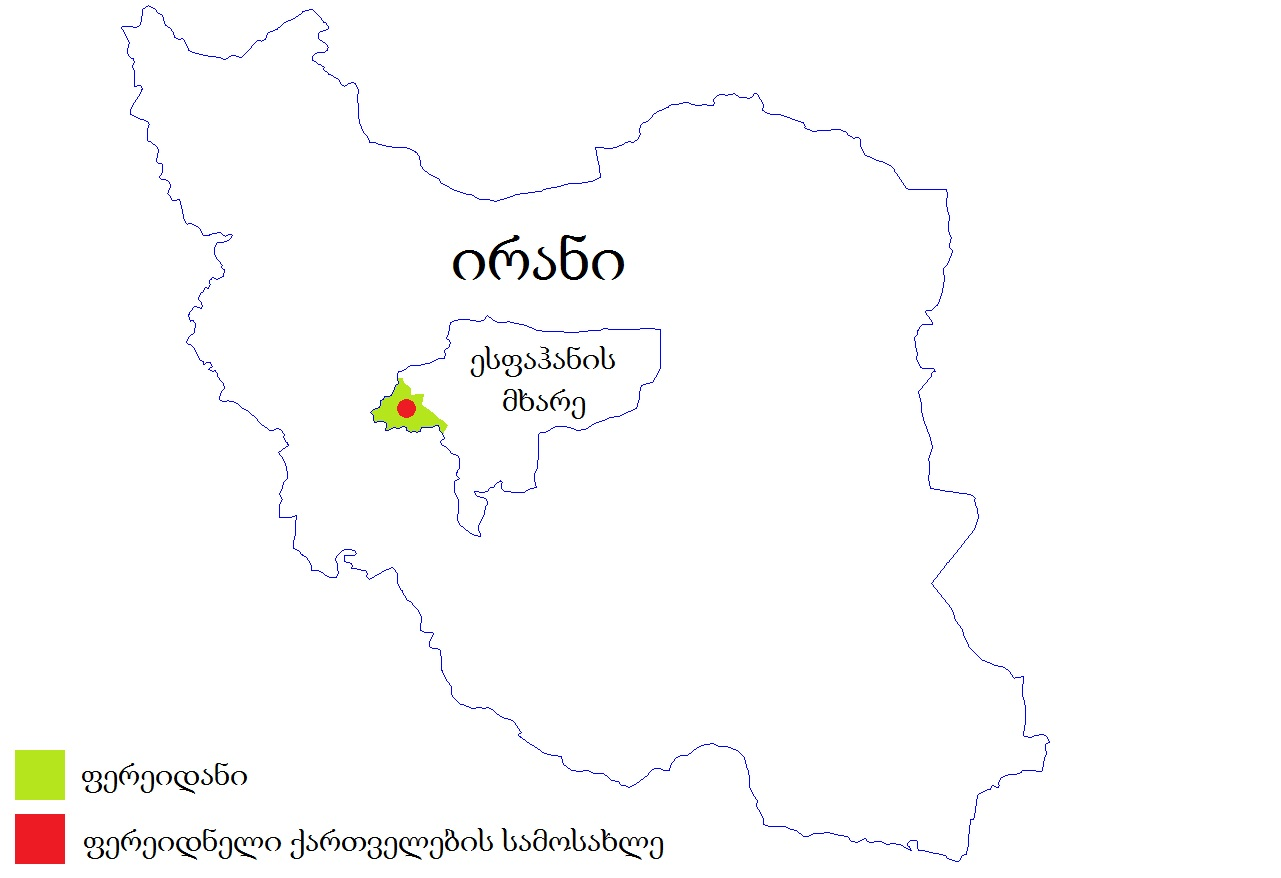 ფერეიდნელი ქართველების სამოსახლე ირანის რუკაში